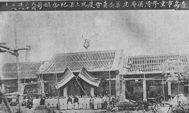 青岛市重修清溪庵建筑委员会庆祝上梁纪念，民国三十年八月八日